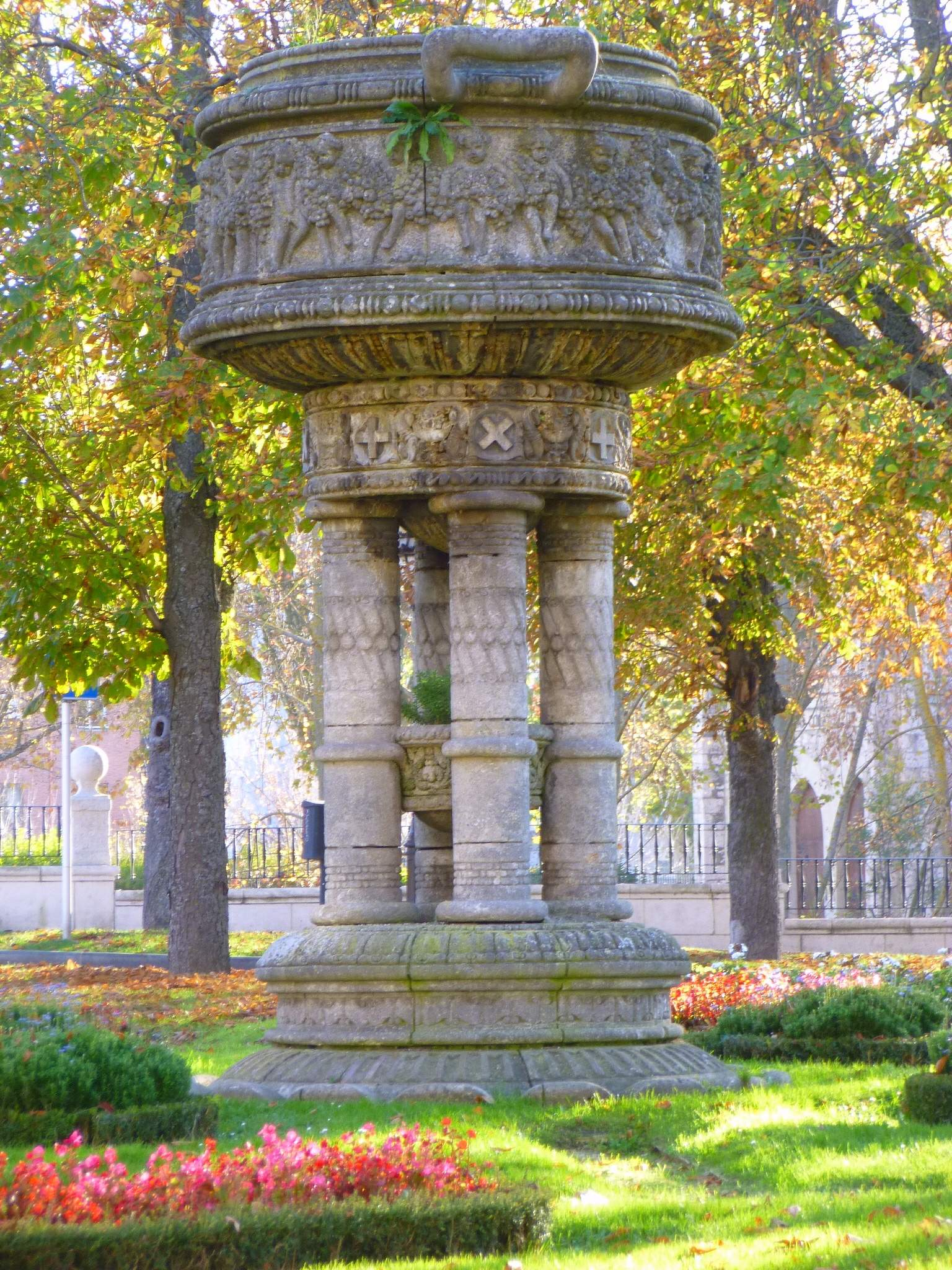 Burgos - Parque de la Isla